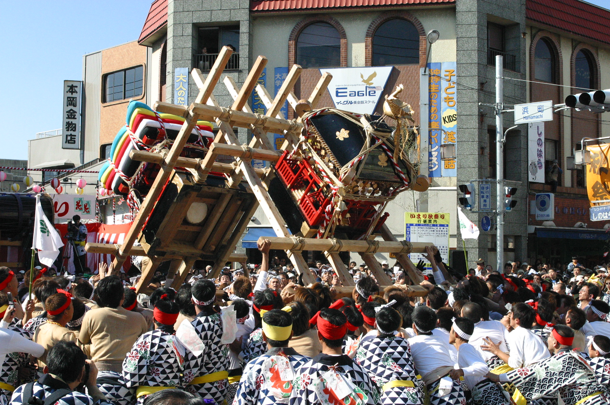 佐賀県伊万里市の伊萬里神社御神幸祭で、伊万里供日と呼ばれて、祭り期間中トンテントンの太鼓の音を合図に、祭り一色に染まり、市内数ヶ所で勇壮な合戦絵巻を繰り広げます。 祭り最後に行われる「川落し合戦」では、双方組合ったまま、川に落ち陸に早く引上げられた方が勝ちとなります。 ※平成18年まで毎年１０月２２日・２３日・２４日に行われていましたが、現在日程が変更となり、合戦も奉納合戦として行われる予定です。